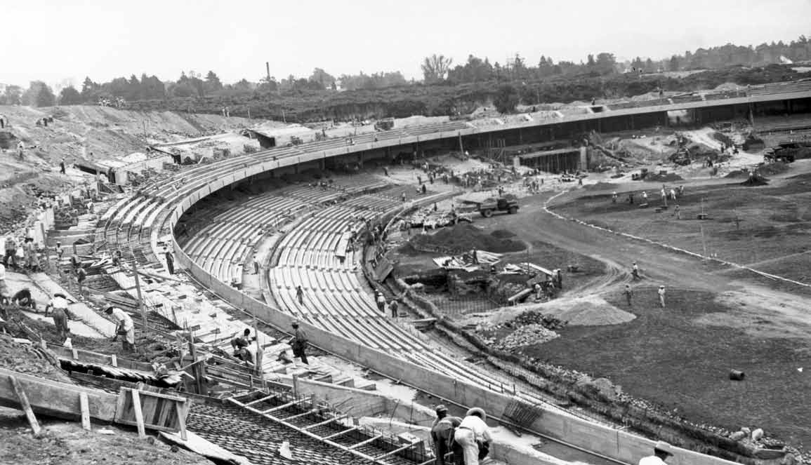 Construcción de graderías en González, Lourdes. "El Estadio Olímpico Universitario del Pedregal. Permanencia y vigencia", Revista Arquitectura vol. 21, UNAM, 201, pp. 34